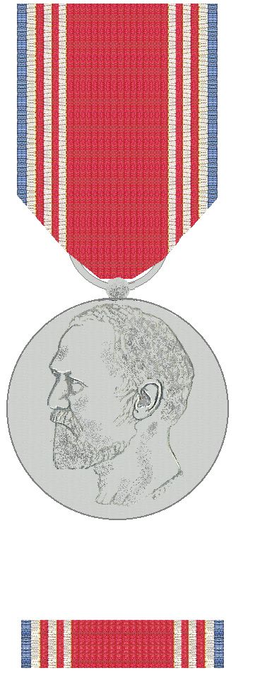 Medaille van het Carnegie Heldenfonds 1928